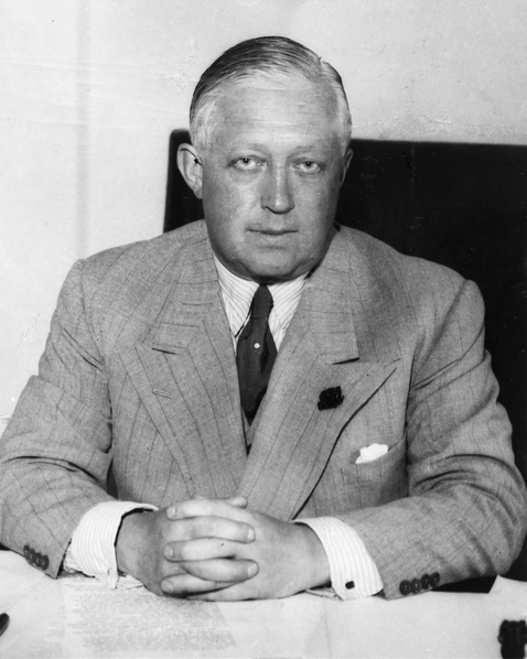 portrett, mann, forlagsdirektør, sittende halvfigur ved skrivebord.